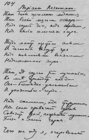 Вариант стихотворения "Незнакомка". Автограф А. А. Блока